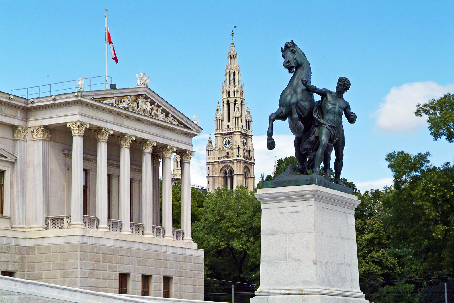 Pallas Athene vor dem Parlament in Wien